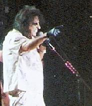 Emiliàn e rumagnòl: Alice Cooper durànt un sò cuncèrt a Milàṅ in dal Nuvémbar dal 2010